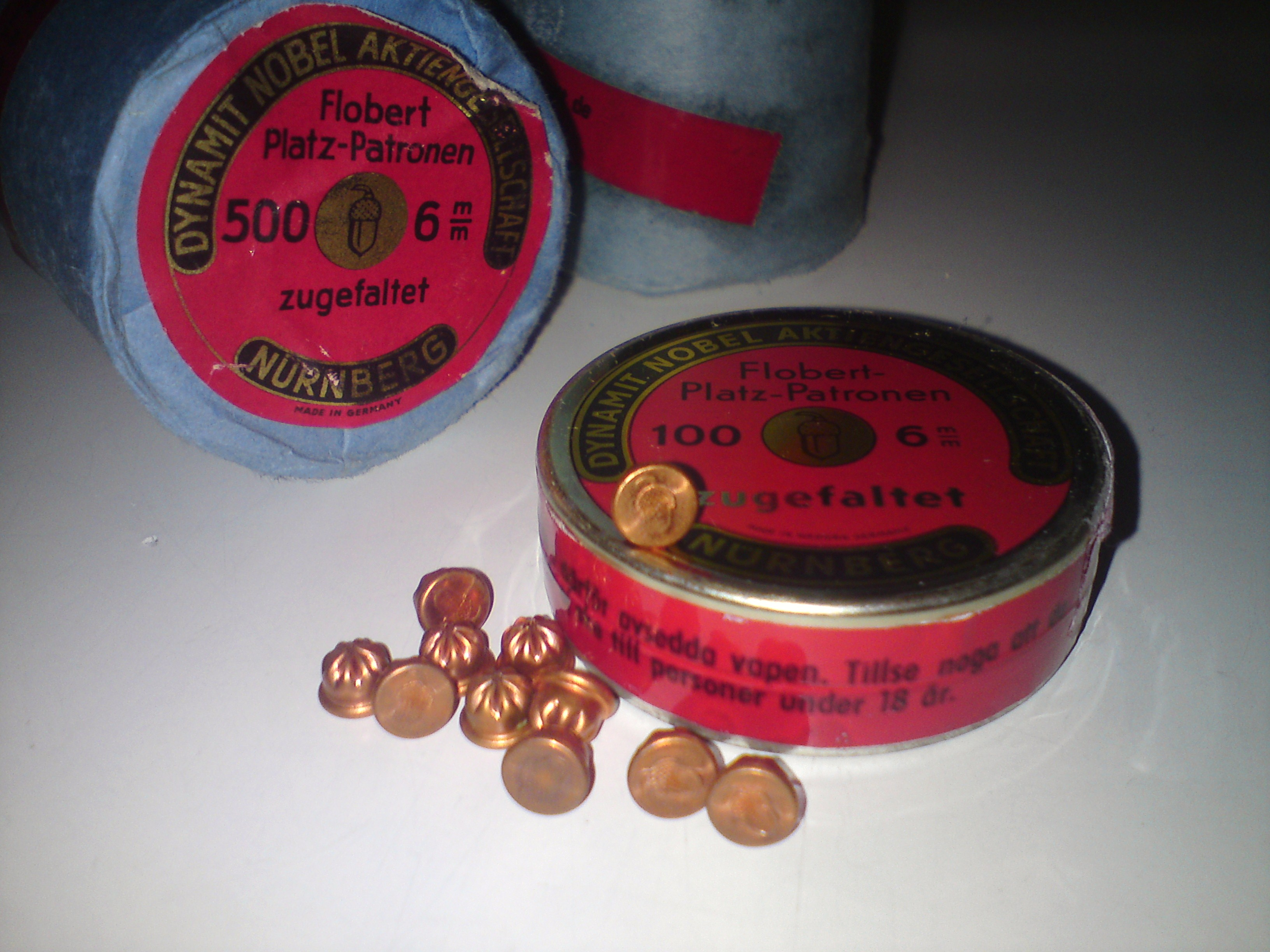 Ollonskott